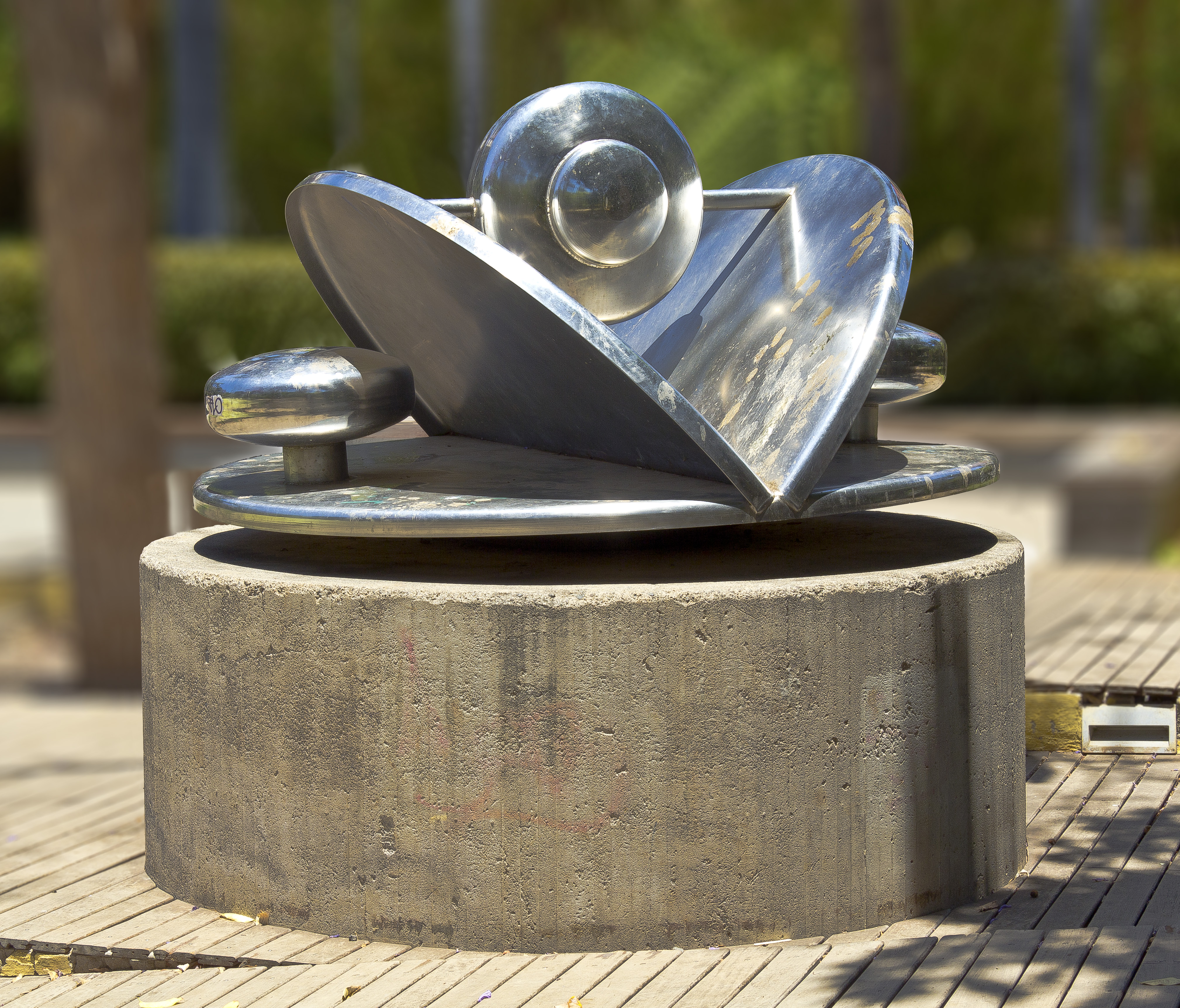 Die Edelstahlplastik „Homenaje a Millares“ des französischen Künstlers Claude Viseux wurde 1973 im Rahmen der Initiative „Escultura en la Calle“ der Architektenkammer der Kanarischen Inseln im Parque García Sanabria in Santa Cruz de Tenerife aufgestellt. Die Plastik hat die Maße 1,22 x 2,00 x 2,00m